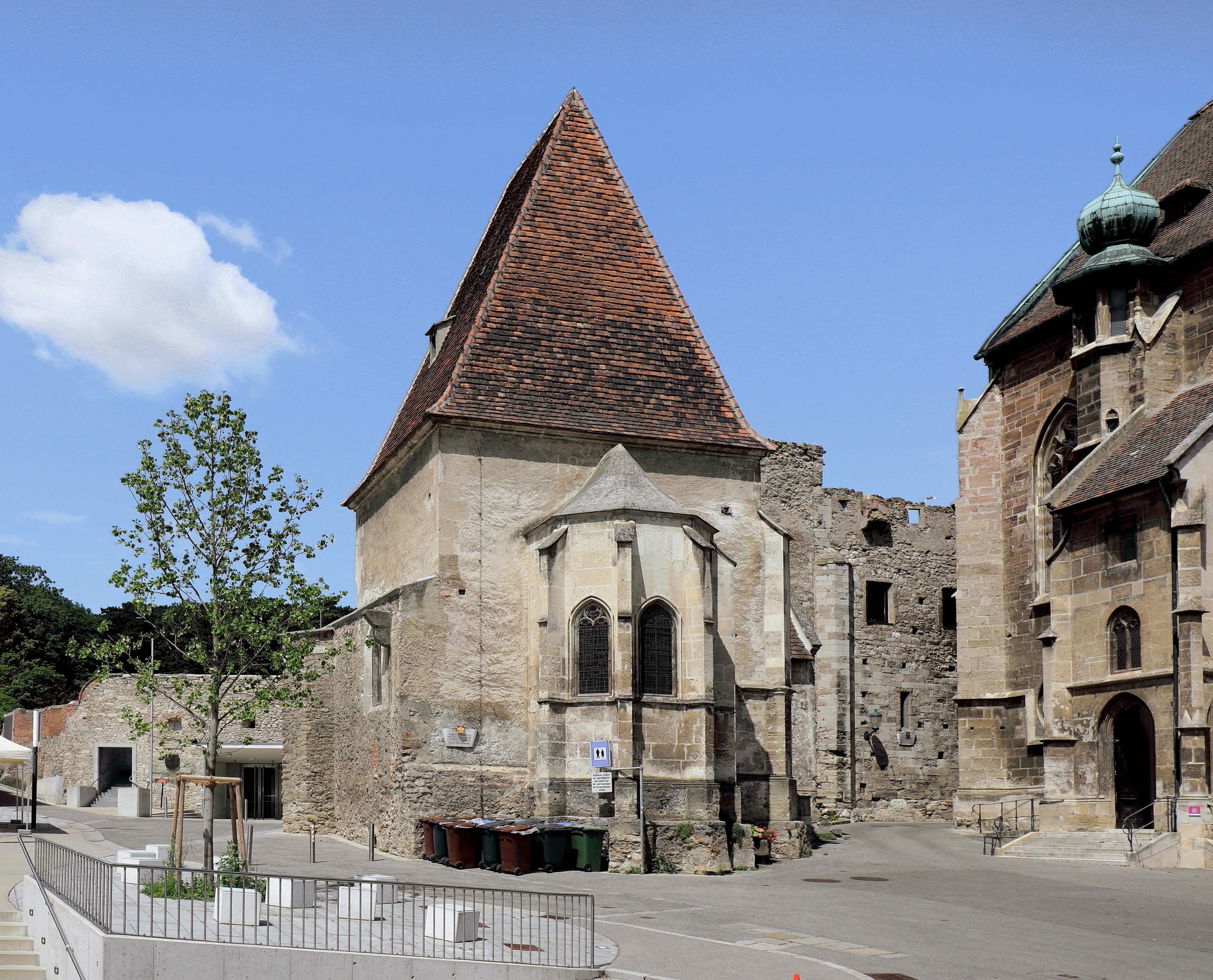 In der Bildmitte die Martinskapelle bzw. der ehemalige Karner in der niederösterreichischen Marktgemeinde Perchtoldsdorf. Dahinter die Mauerreste der ehemaligen landesfürstlichen Burg und rechts zum Teil die Pfarrkirche hl. Augustinus. Der spätgotische Karner wurde 1520 geweiht und dient nach unterschiedlichen Nutzungen seit 1953 als Kriegergedächtniskapelle.